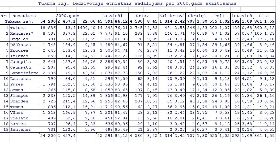 результаты переписи населения Латвии ни 01.04.2000